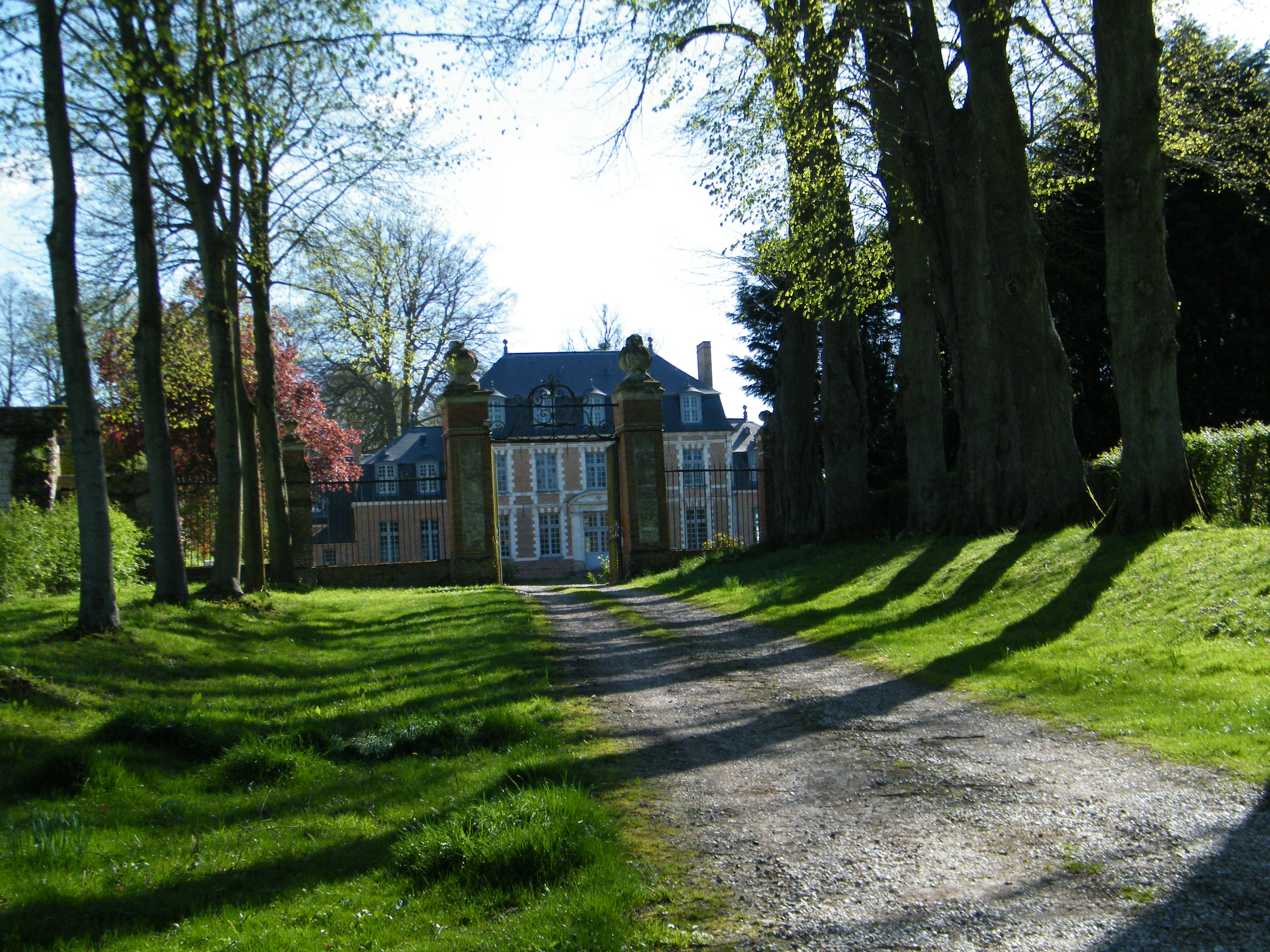 Le château de Foucaucourt-Hors-Nesle.